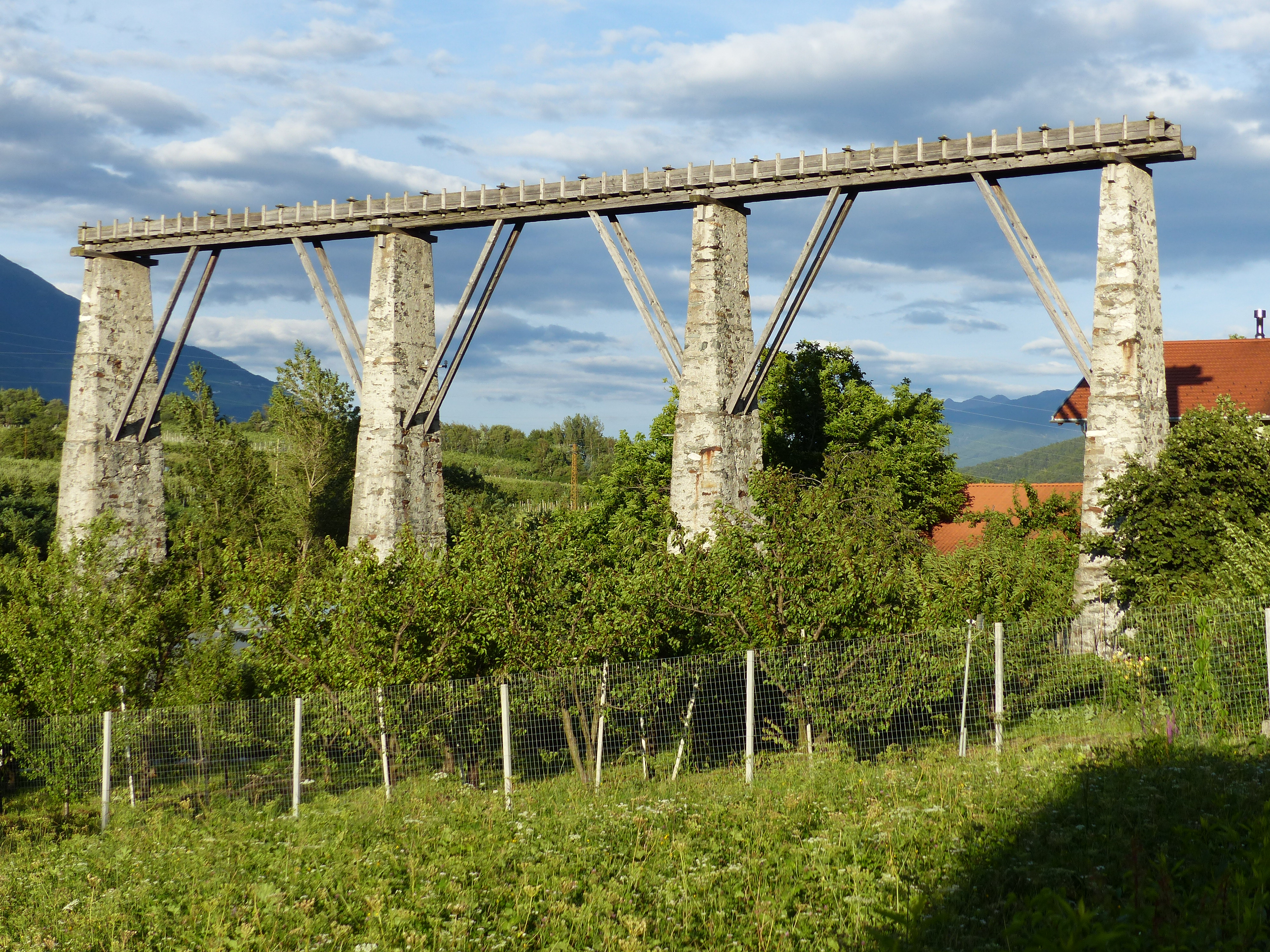 Aquädukt-Reste des Kandlwaals in Laas